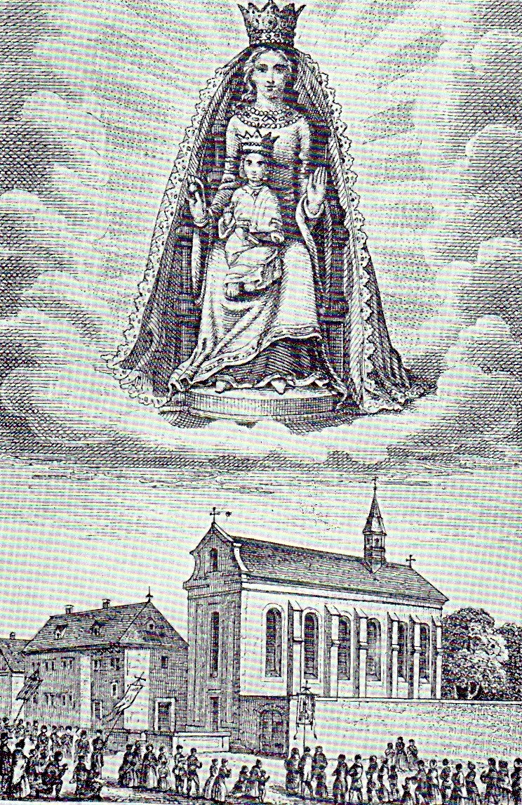 Erinnerungsblatt an die 200 Jahr-Feier der Marienwallfahrt nach Werl 1861, mit der alten Wallfahrtskirche und dem ehemaligen Kapuzinerkloster